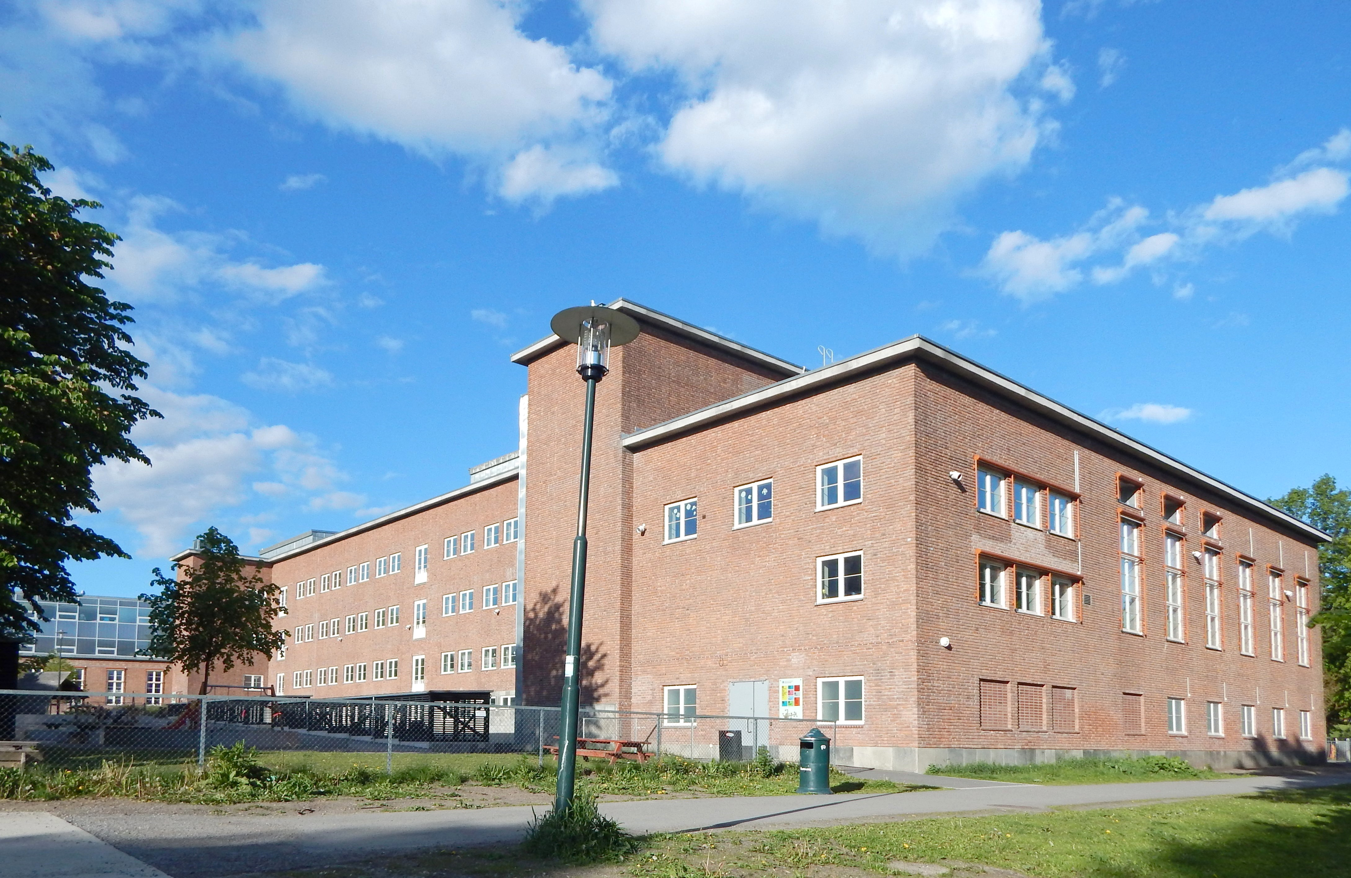 Marienlyst skole